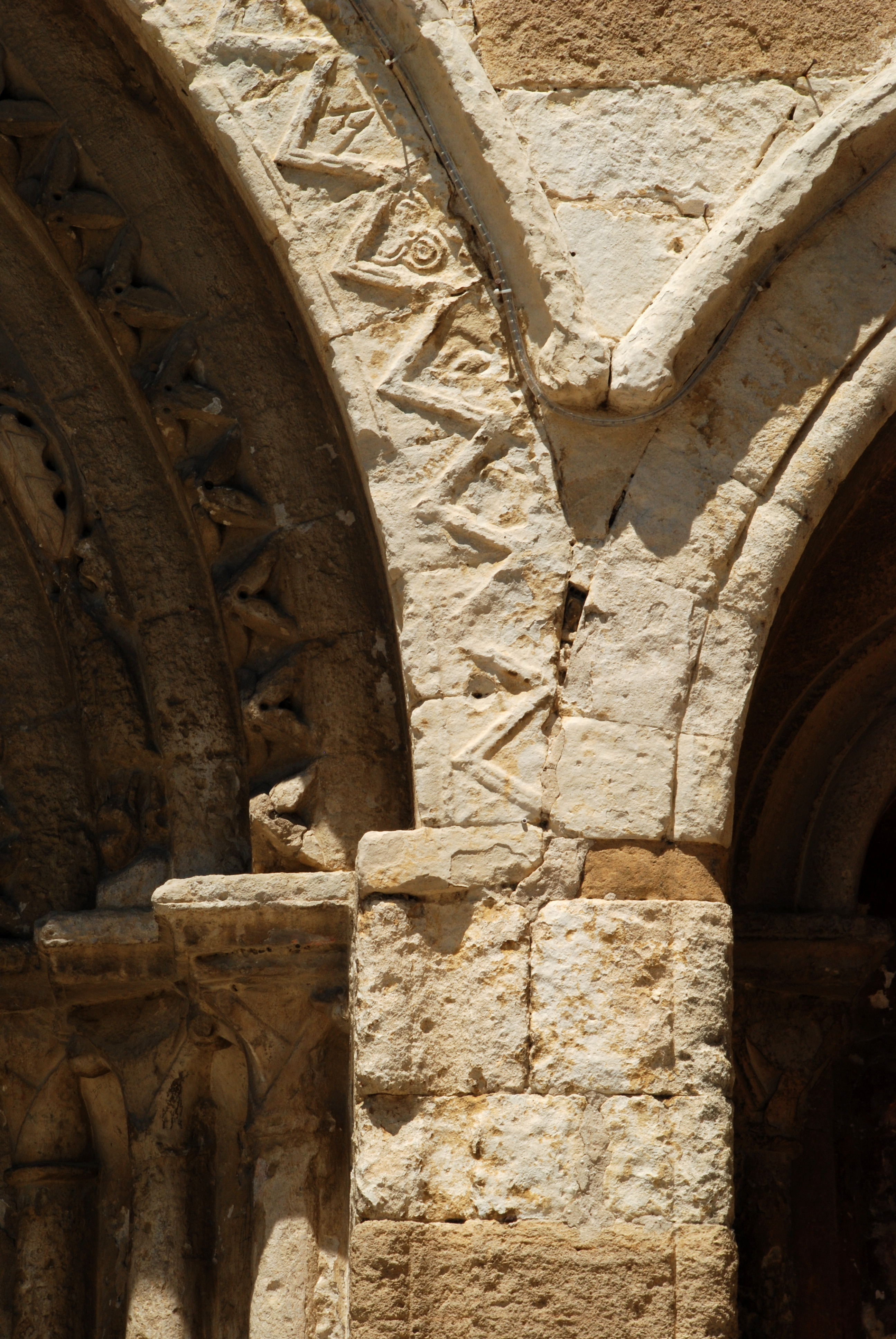 France - Provence - Église Notre-Dame-de-Nazareth de Valréas